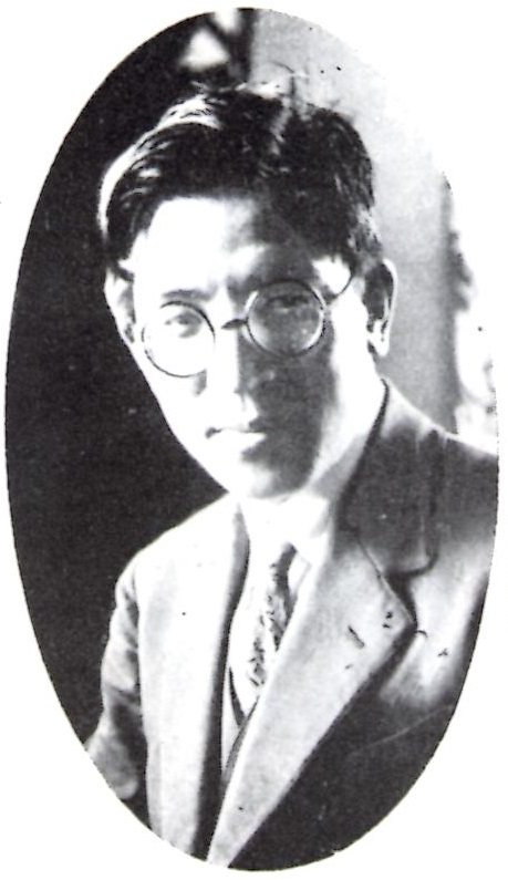 昭和7年、札幌放送局が出版した『北海道郷土史研究』に掲載。 This photographic image was published before December 31st 1956, or photographed before 1946, under the jurisdiction of the Government of Japan. Thus this photographic image is considered to be public domain according to article 23 of old copyright law of Japan (English translation) and article 2 of supplemental provision of copyright law of Japan. To uploader: Please provide an image source.